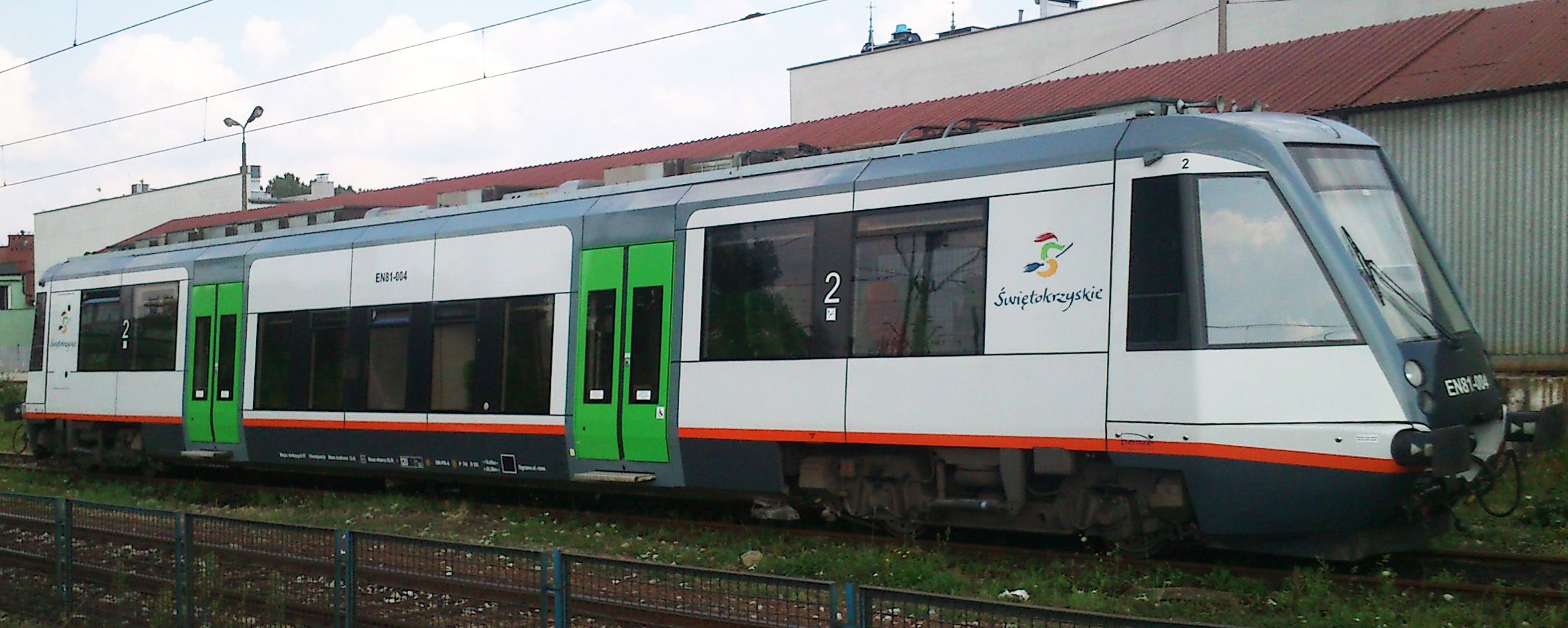 Świętokrzyski 308B przy stacji w Kielcach